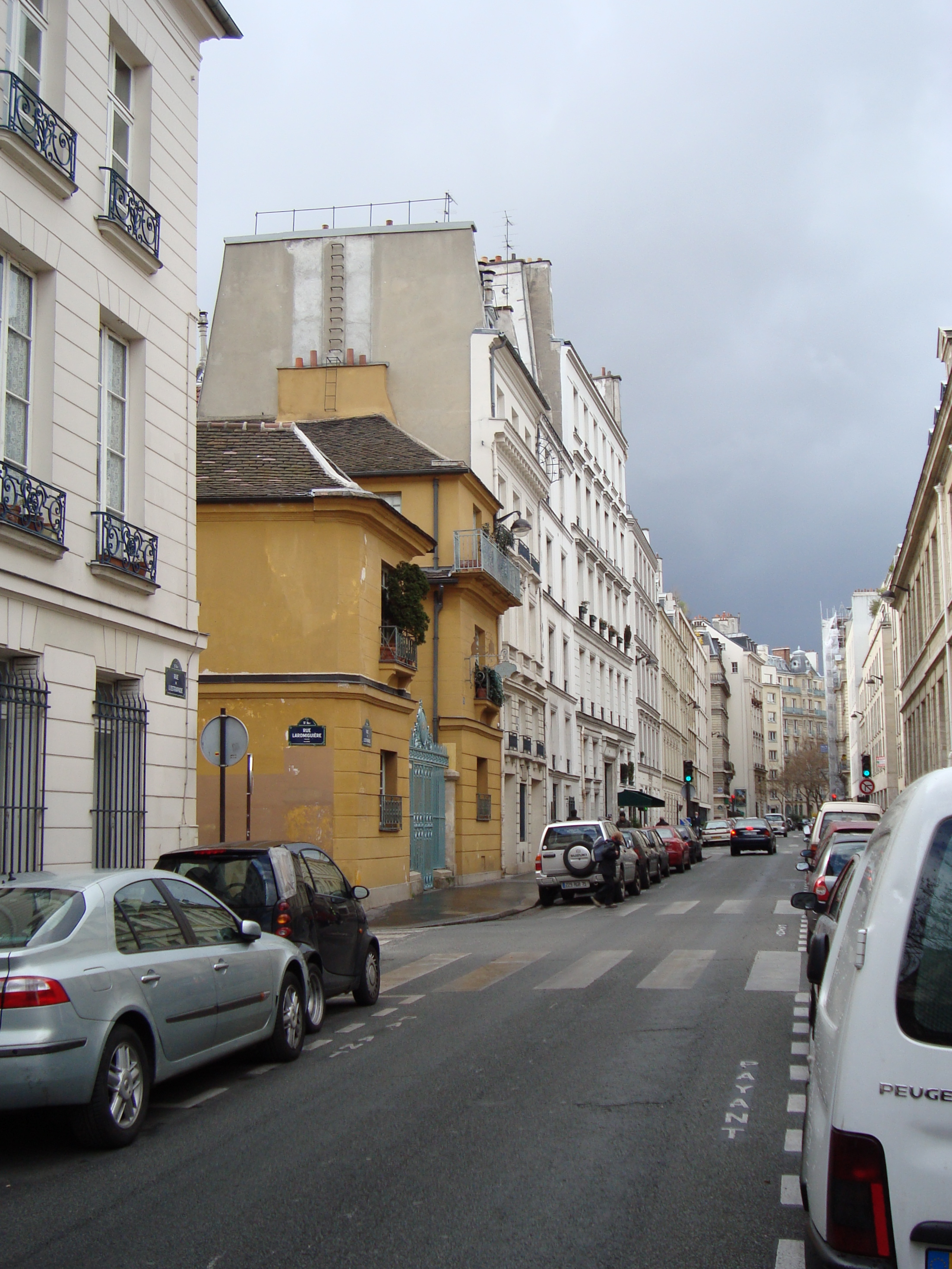 Rue de l'Estrapade # Paris derrière la place du Panthéon